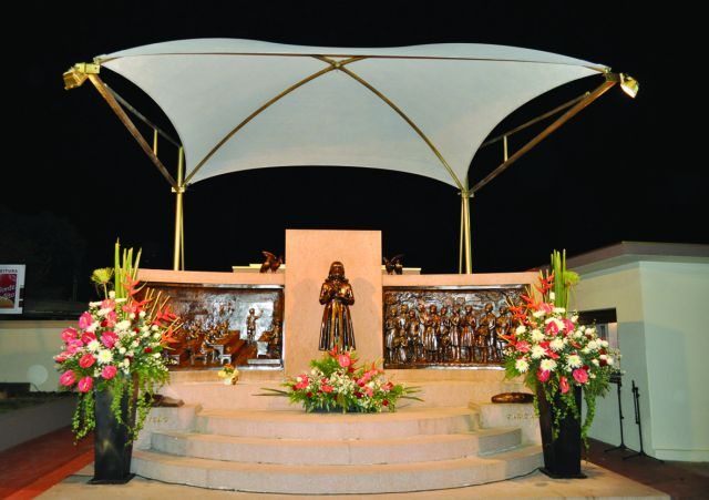 Menina Izildinha Enfeitada Monte Alto Sp